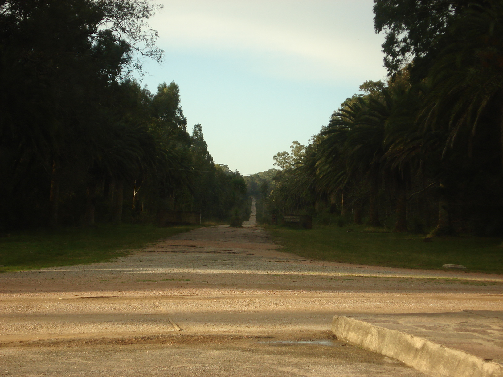 Parque Santa Teresa, Uruguay.